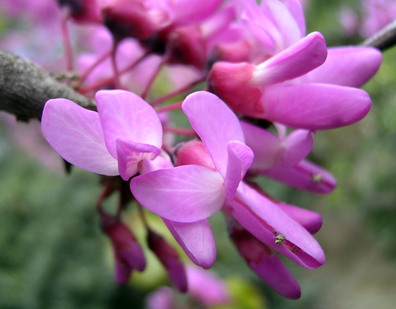 Cercis Siliquastrum, Fabaceae, Caesalpinioideae, árbol del amor, árbol de Judea o de Judas, en Jardì Botánic de Caixa de Girona-Cap Roig, árboles ornamentales